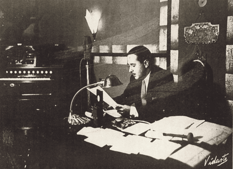 O radialista brasileiro César Ladeira em 1937.